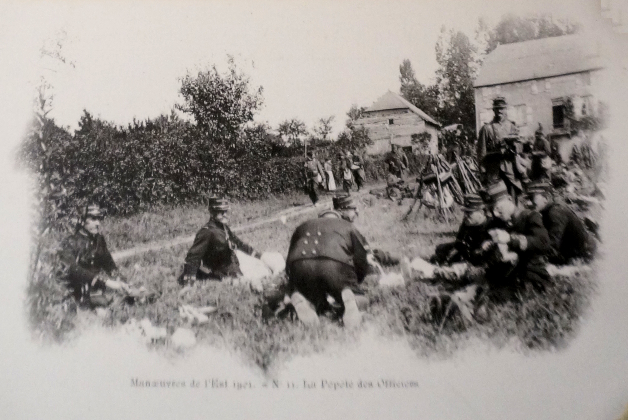 Lors des Grandes manoeuvrves de l'est de 1901, cartes posatles de 1901 de la BM de Reims sous la cote CPA t4.